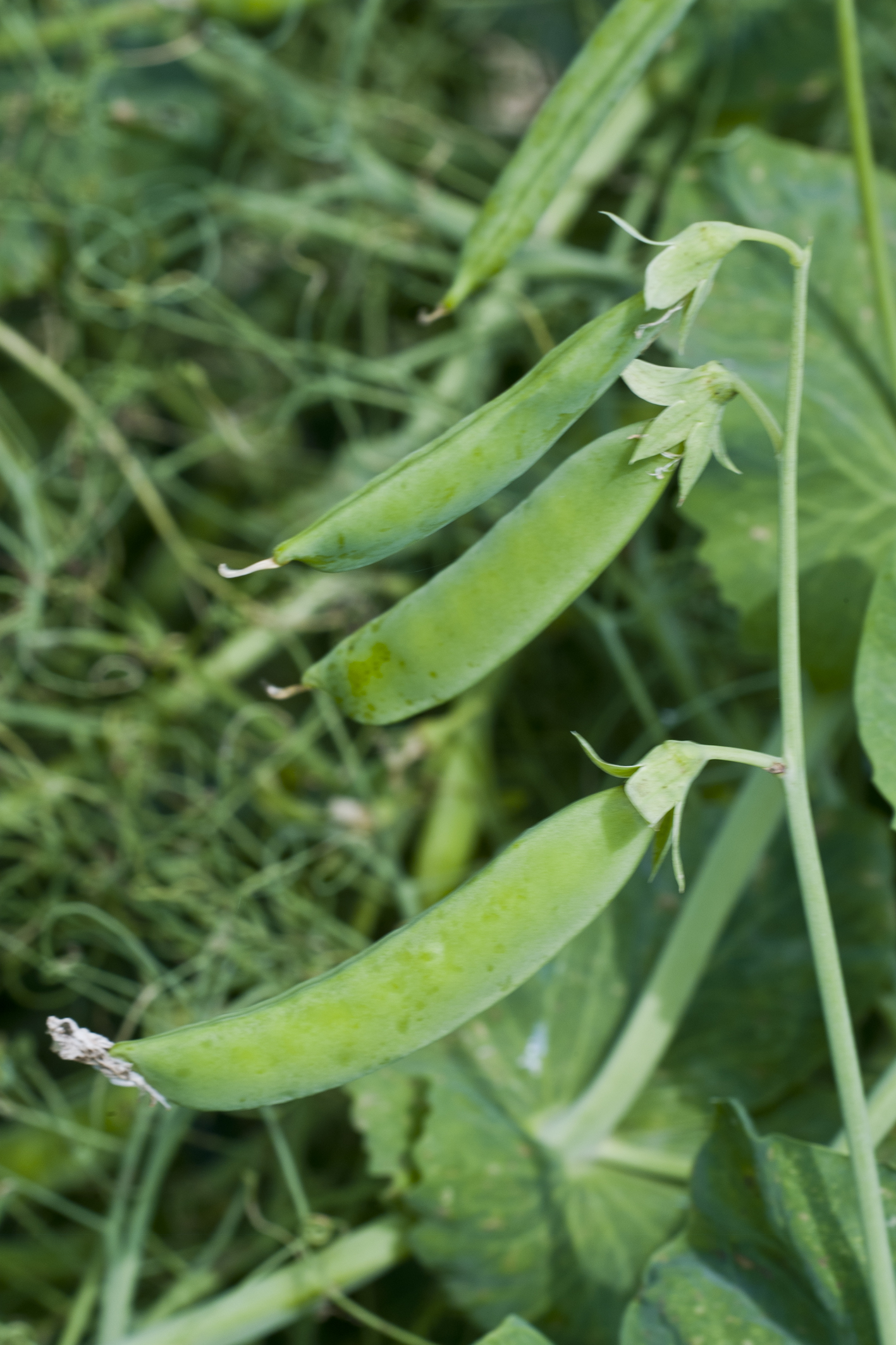 INRA, Jean Weber